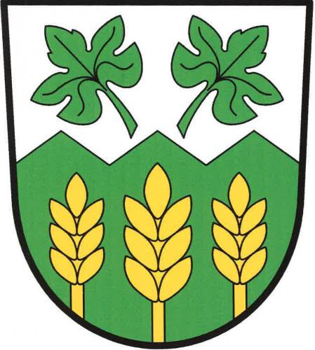 Sedlec, okres Mladá Boleslav, znak